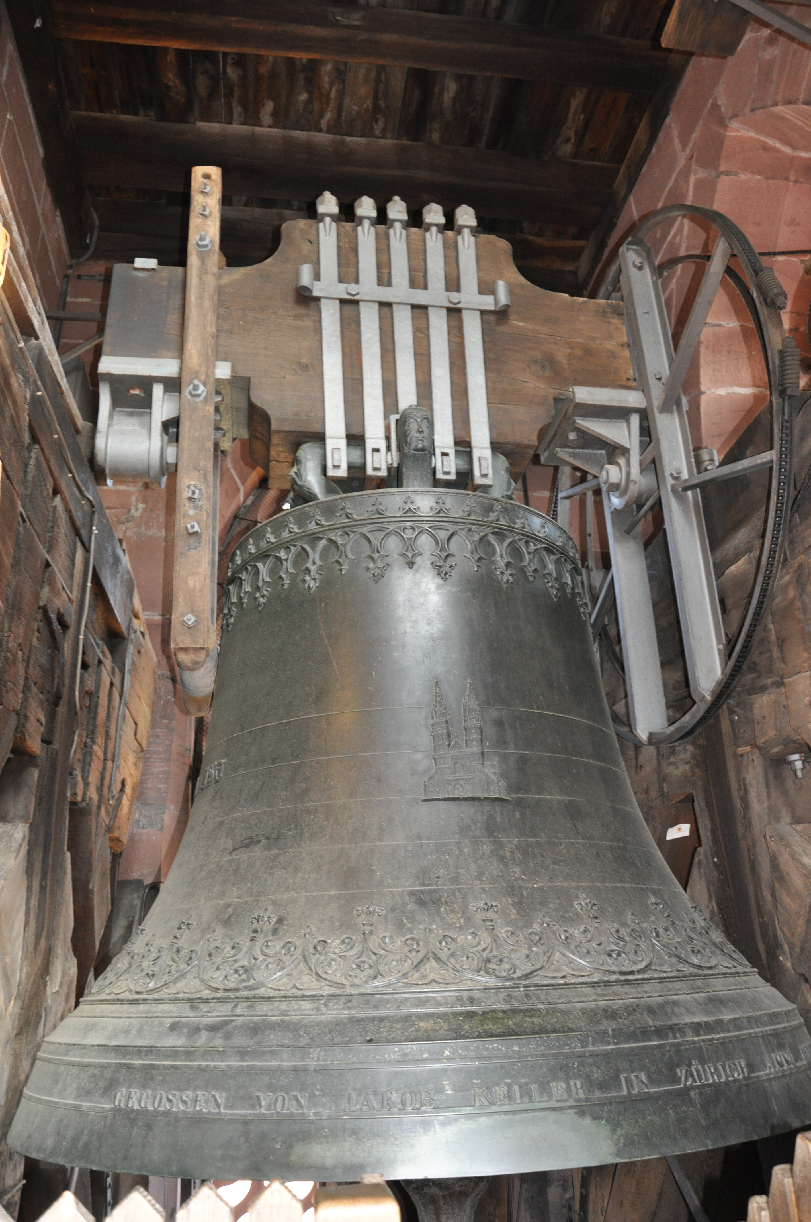 Basel Münster